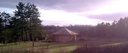 théâtre dans le sud de l'Essonne